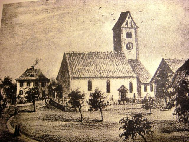 Kirche Wängi (damals paritätisch, heute reformiert) vor der Renovation 1865